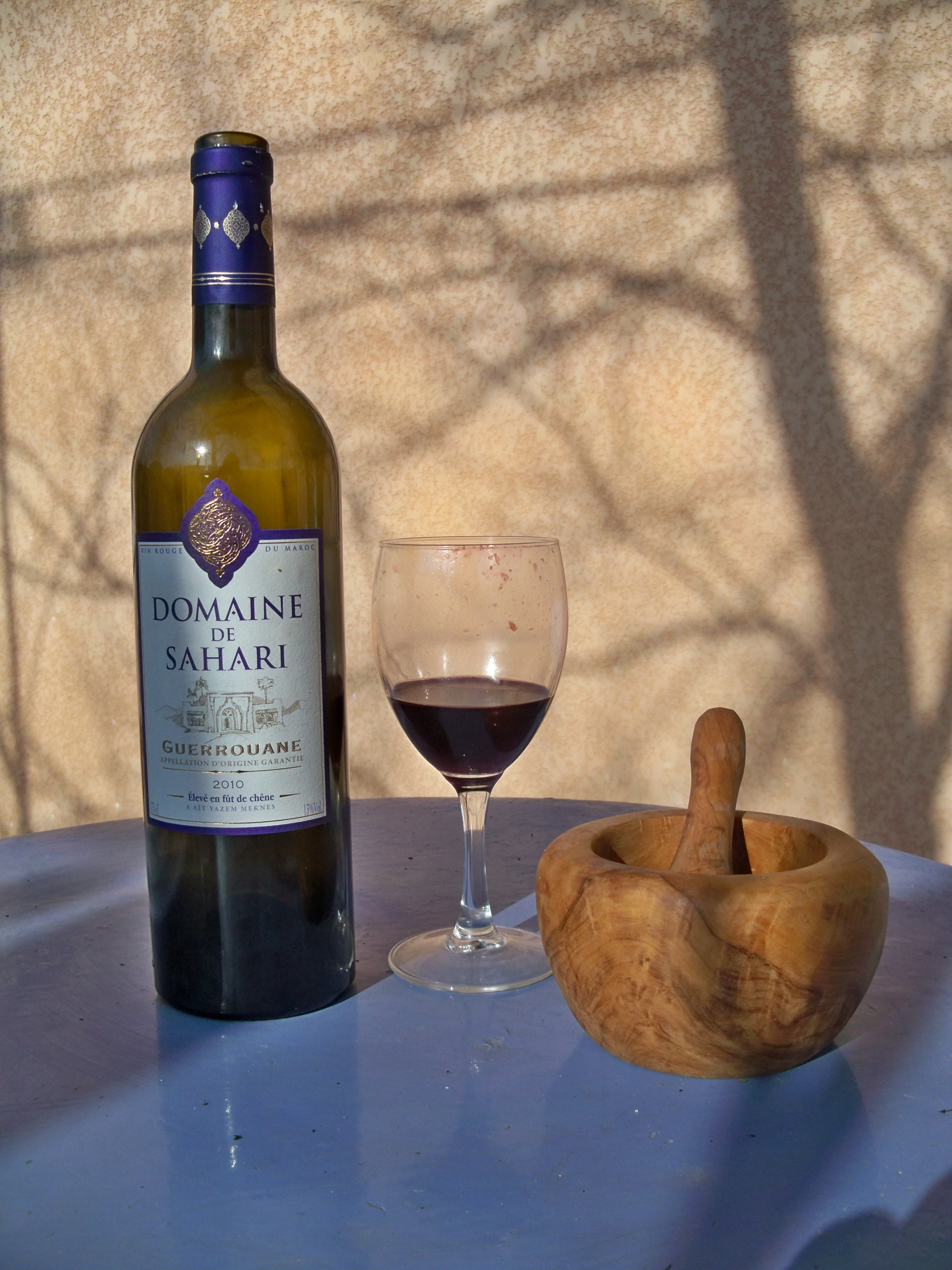 bouteille de Domaine de Sahari, Maroc